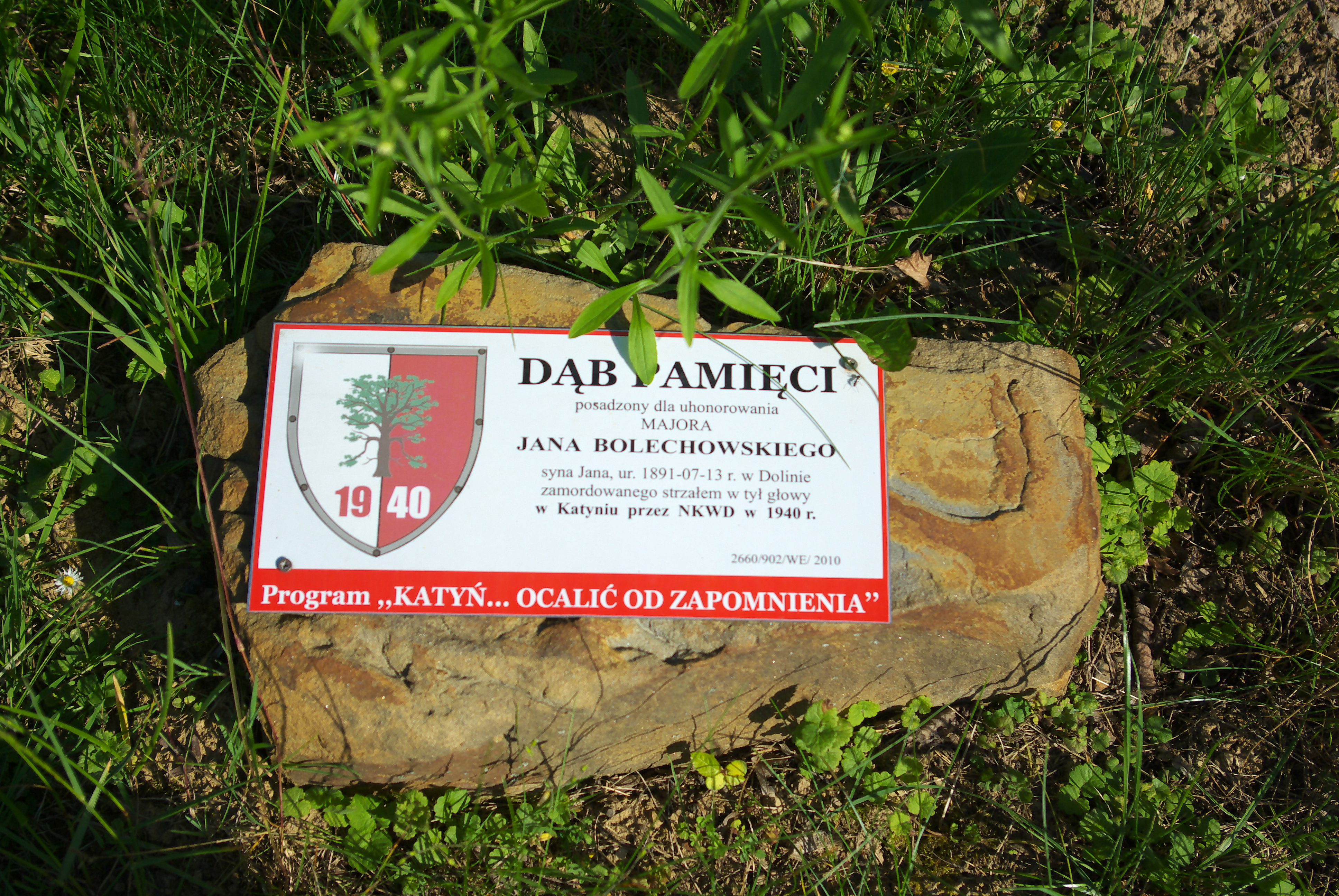 Kamień pamiątkowy w Falejówce przy Dębie Pamięci ofiary zbrodni katyńskiej; uhonorowany Jan Bolechowski